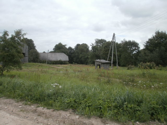 Vaade edelast maanteelt Aloja poolt Stabegi mõisa asukohale. Taamal säilinud mõisa majandushoone kelpkatus.